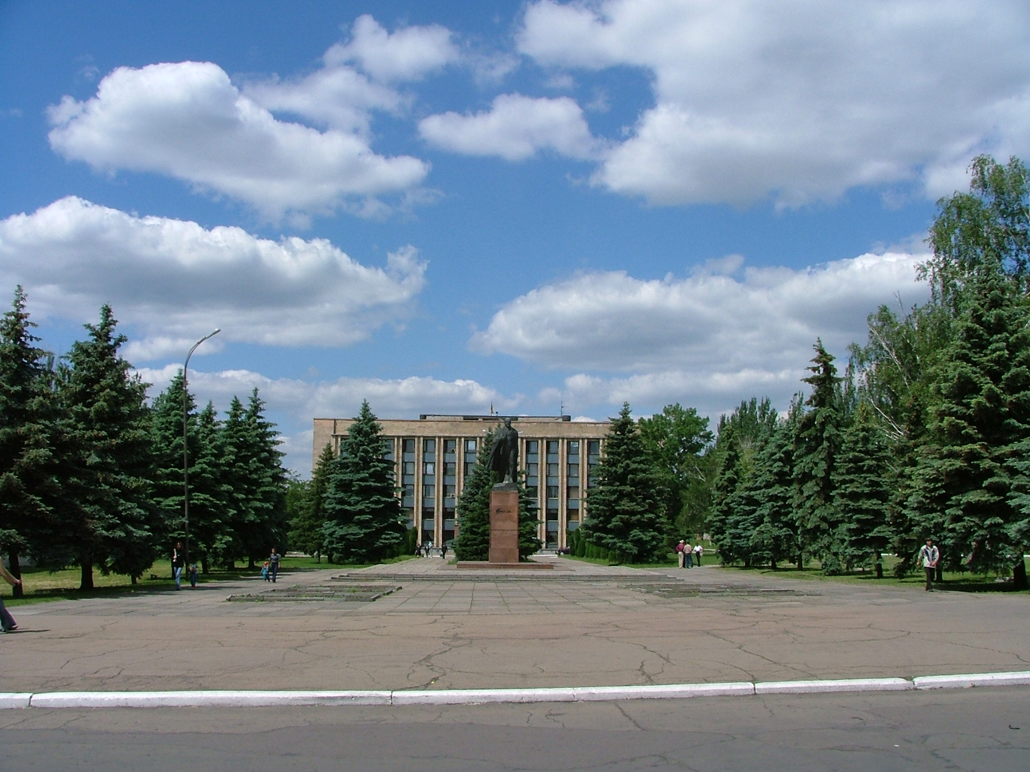 Вид на исполком г. Красный Луч Луганской области. Памятник В. И. Ленину